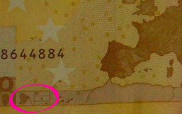 50-Euro-Schein-Rückseite: Ausschnitt zeigt (hervorgehoben) die Überseedepartements Frankreichs Quelle = Eigenes Archiv Urheber= Pygmalion